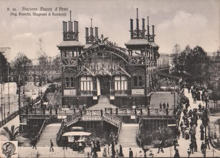 Milano, ferrovia sopraelevata dell'Expo 1906. La stazione in piazza d'armi